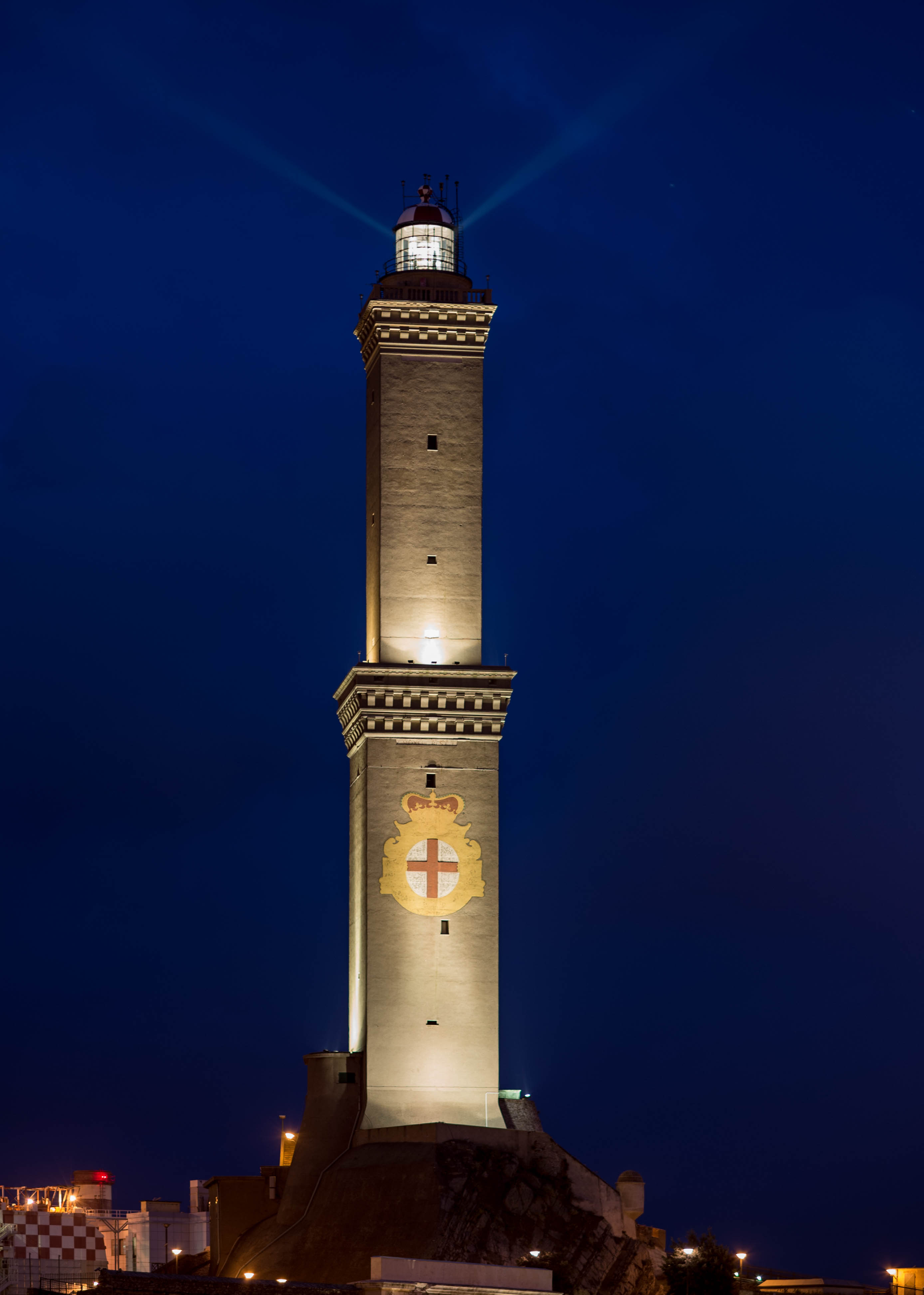 La Lanterna di sera This is a photo of a monument which is part of cultural heritage of Italy.